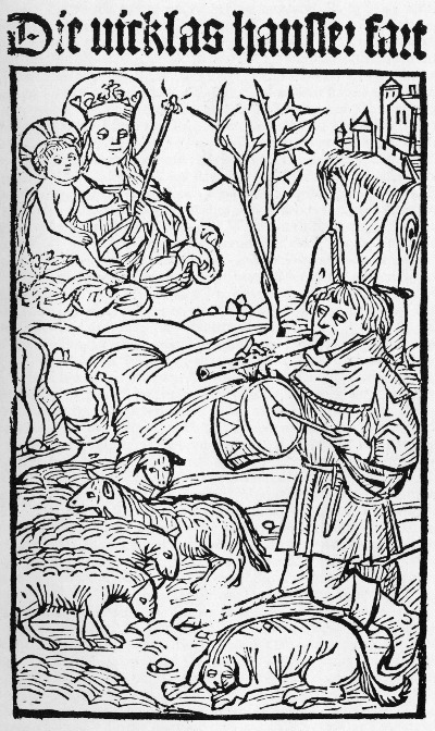 Titelblatt des Drucks der Niklashauser Fahrt